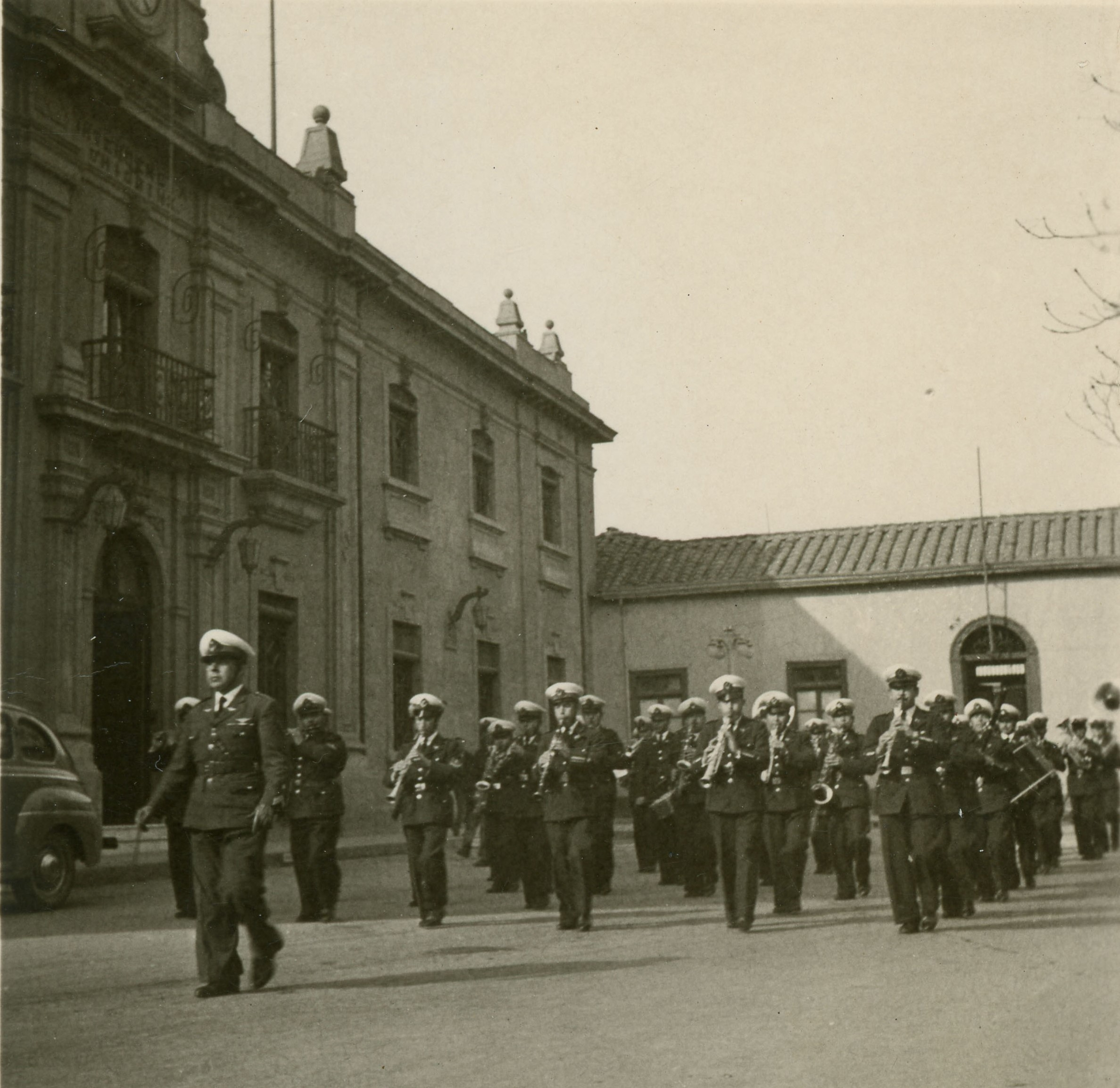 Banda de la Fuerza Aérea de Chile a cargo de su primer director el Capitán Enrique Pacheco García. Desfile en conmemoración de la Batalla de Rancagua en la Plaza de los Héroes.